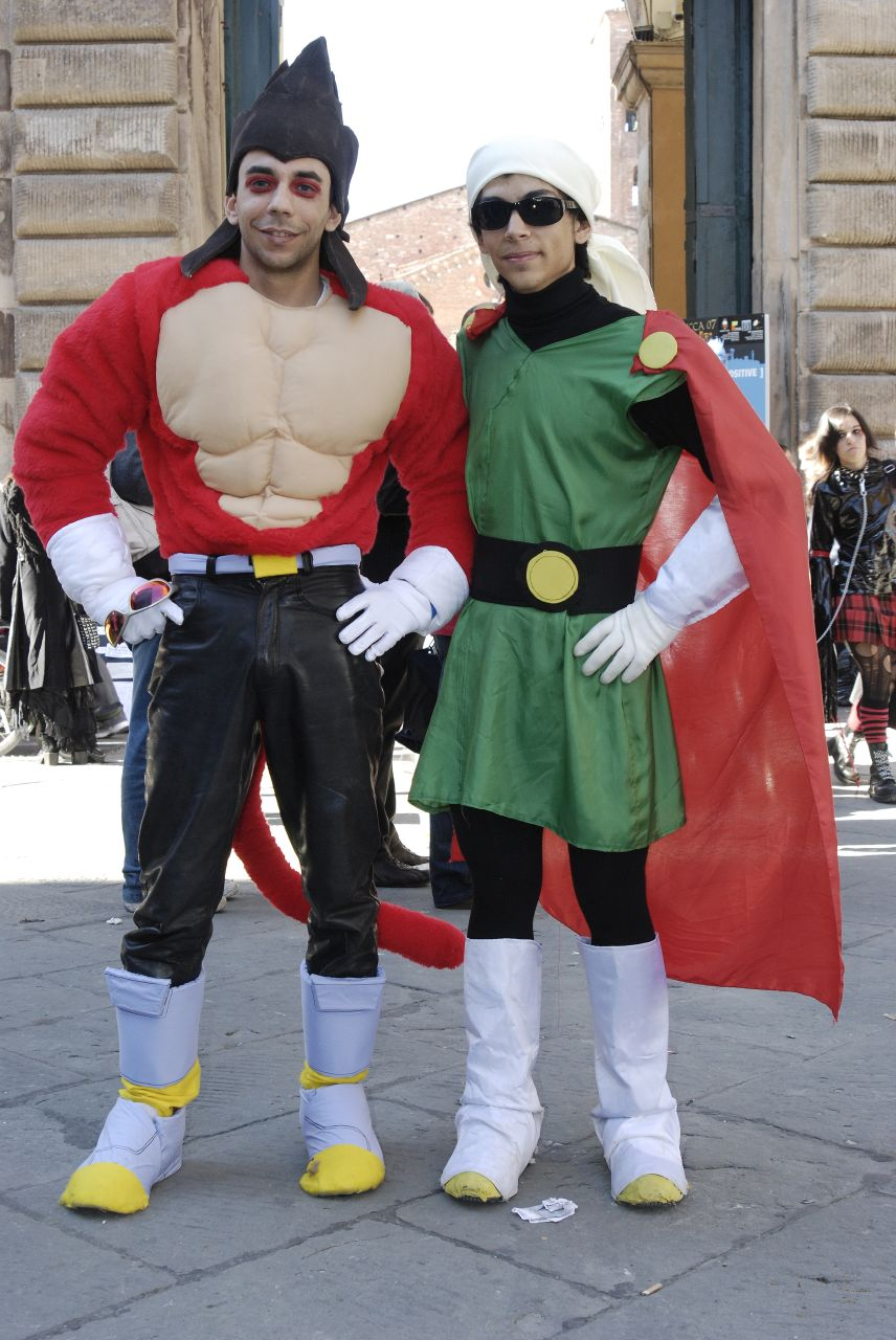 Cosplay de gohan (gran sayaman) y vegeta en super saiyajin 4 de la serie dragon ball z